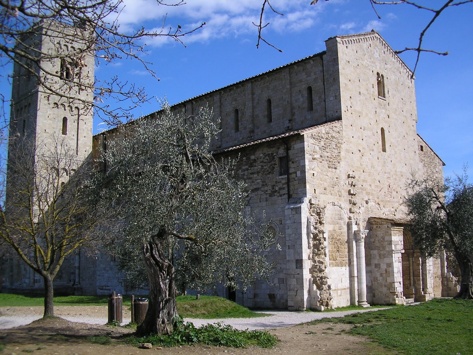 Facciata della splendida Abbazia